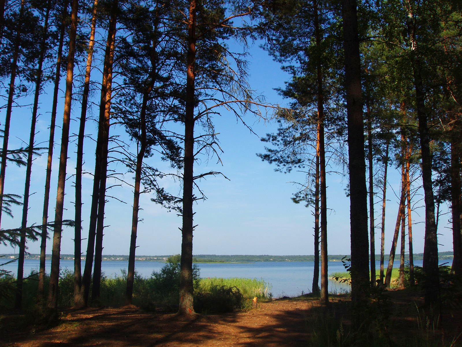 Васькин бор, Белозерский район This image is related to the protected area of Russia number 3510028